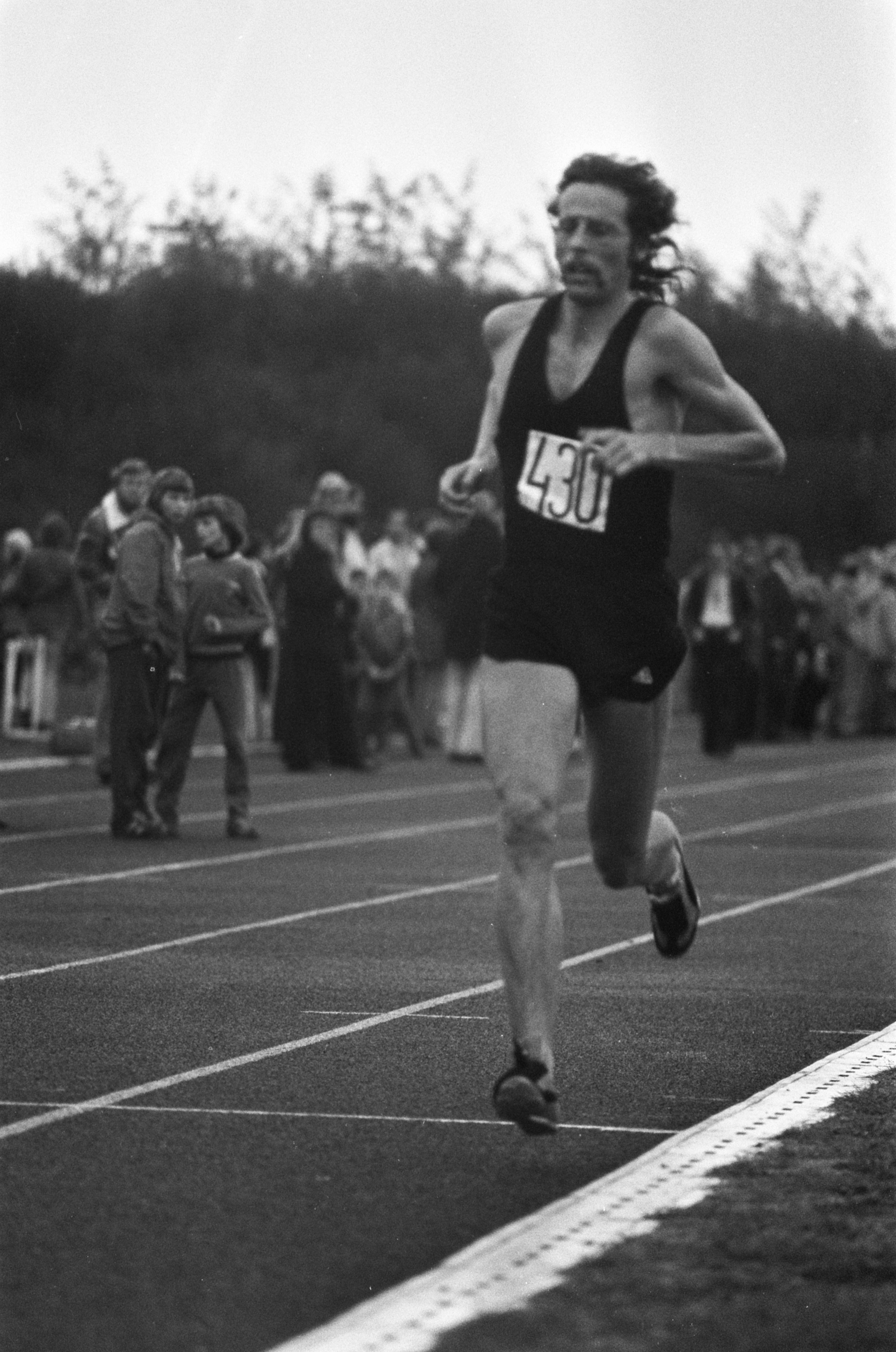 Collectie / Archief : Fotocollectie Anefo Reportage / Serie : [ onbekend ] Beschrijving : Jos Hermens verbetert wereldrecord tien Engelse mijlen op Papendal; Jos Hermens tijdens zijn race Datum : 14 september 1975 Trefwoorden : atletiek, wereldrecords Persoonsnaam : Jos Hermens Instellingsnaam : Papendal Fotograaf : Peters, Hans / Anefo Auteursrechthebbende : Nationaal Archief Materiaalsoort : Negatief (zwart/wit) Nummer archiefinventaris : bekijk toegang 2.24.01.05 Bestanddeelnummer : 928-1532